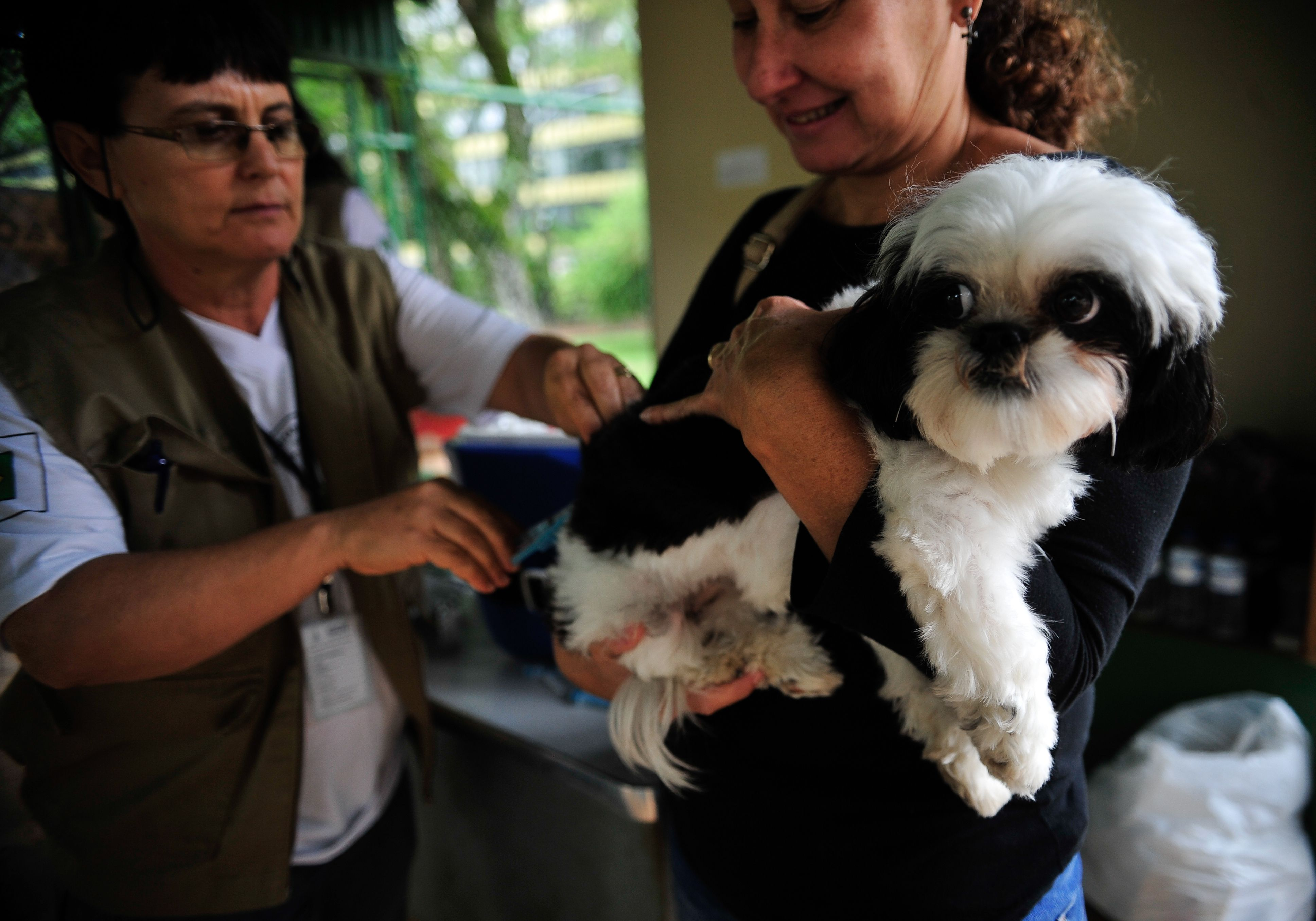 Brasília - A Secretaria de Saúde do Distrito Federal faz campanha de vacinação antirrábica para cães e gatos da área urbana (Marcelo Camargo/Agência Brasil)